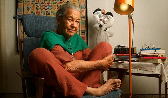 אורנה פורת - בימוי ומשחק